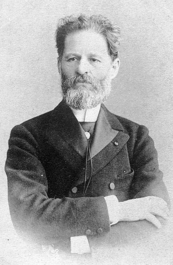 Mark Antokolsky